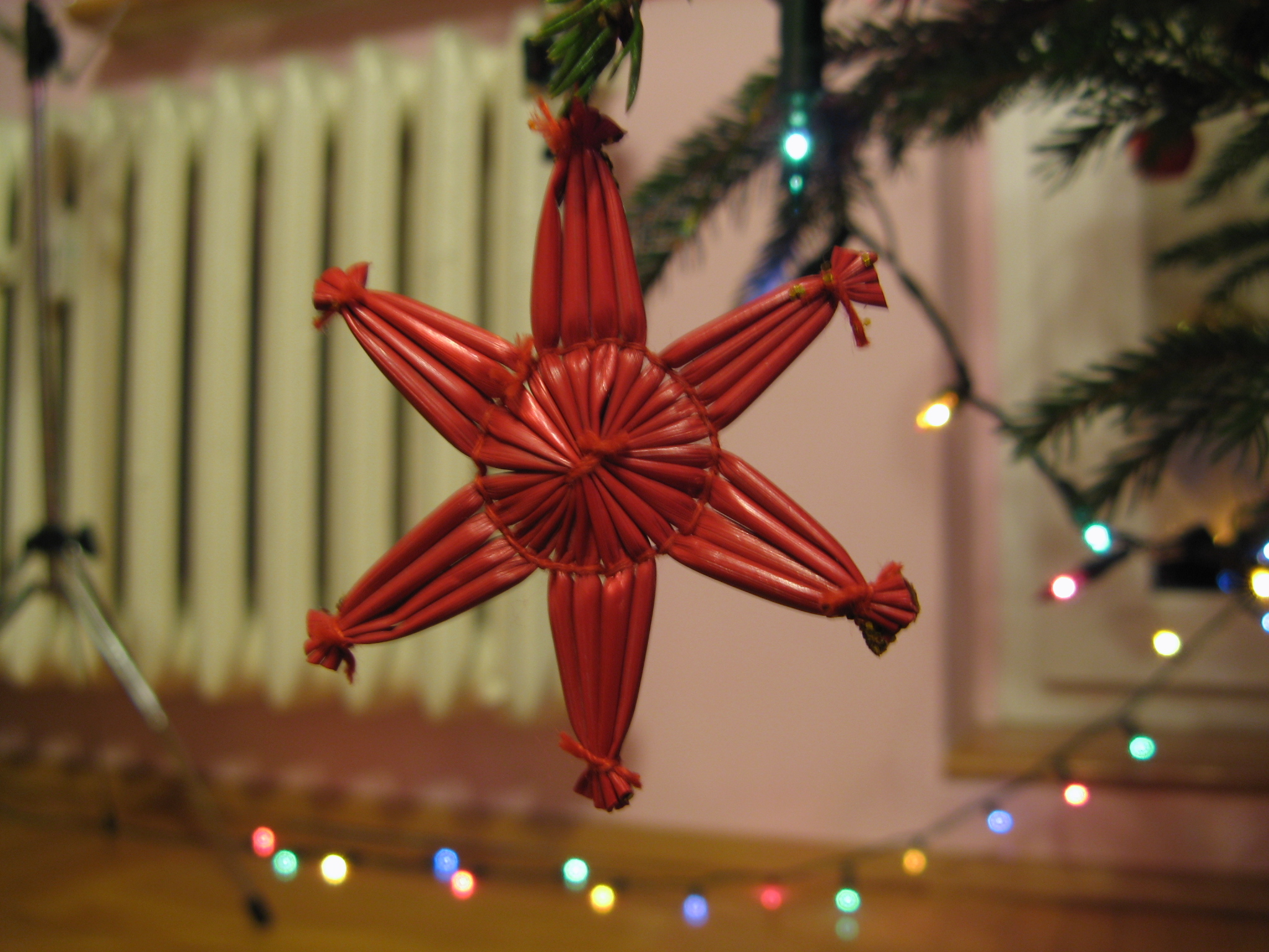 Star